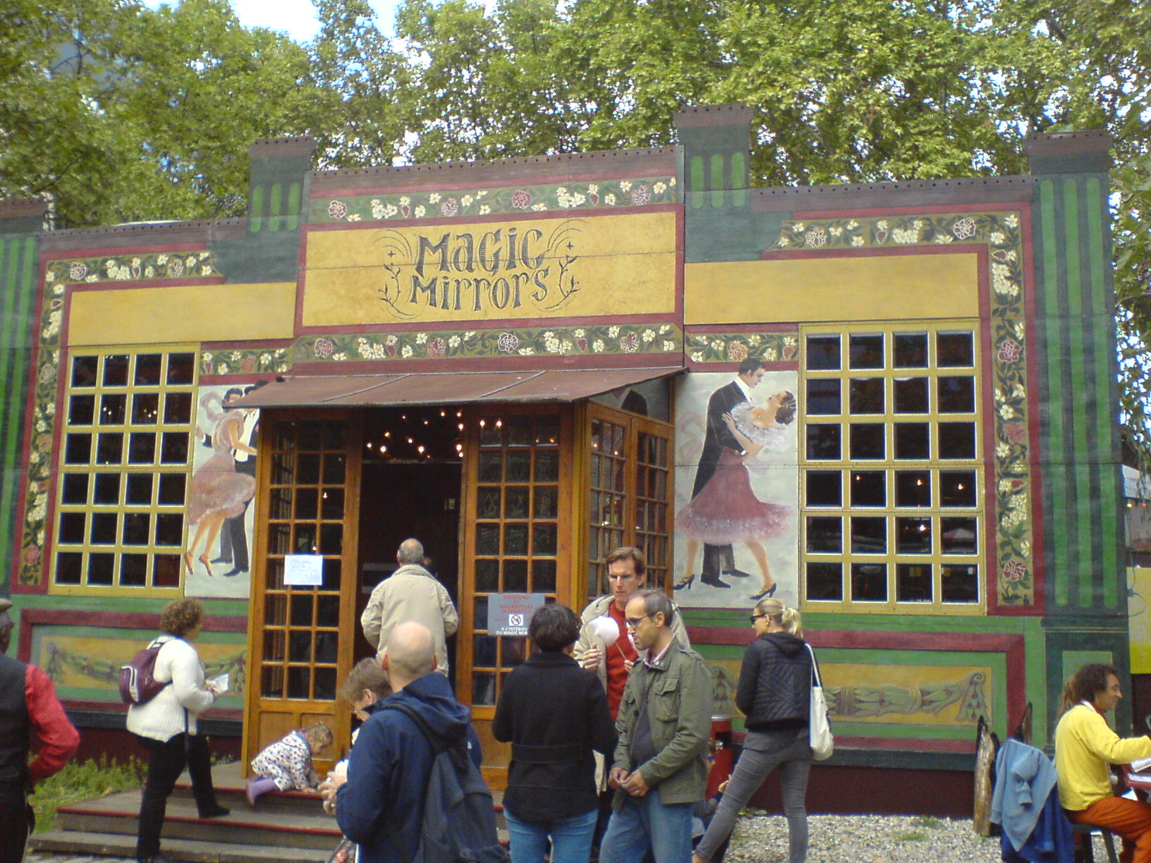 Un Magic Mirror restauré est l'un des bâtiments formant le Musée des arts forains. Septembre 2017.